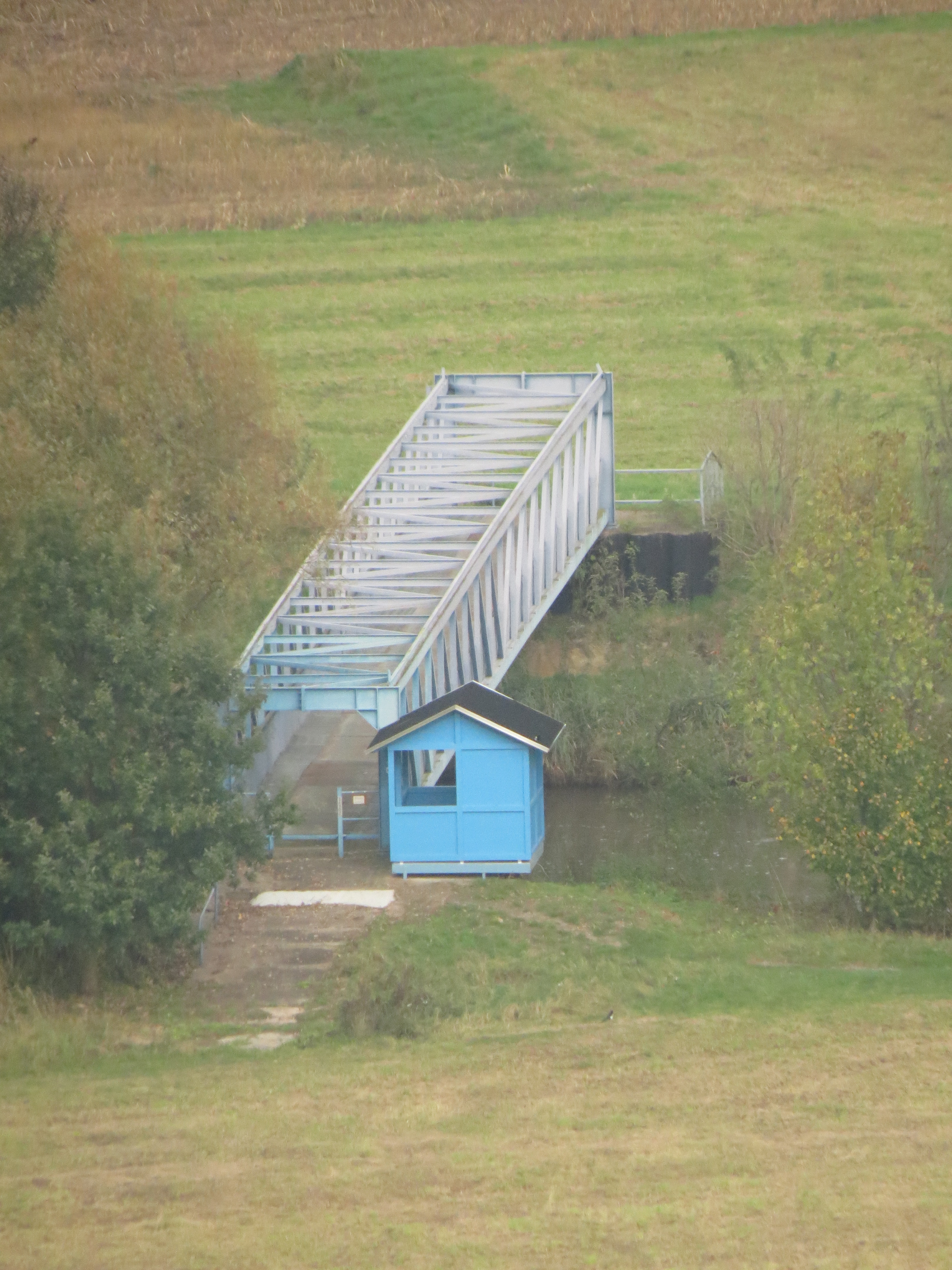 Flusssperrwerk Göringen vom Göringer Stein aus gesehen